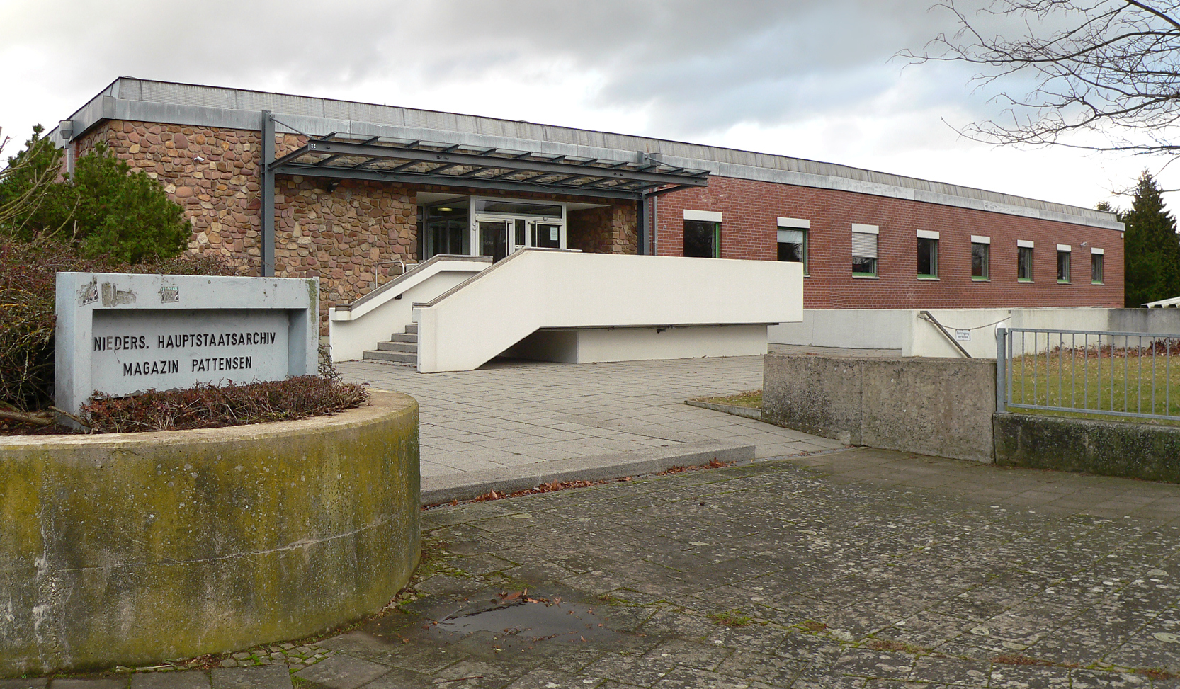 Niedersächsisches Landesarchiv - Hauptstaatsarchiv Hannover Standort Pattensen